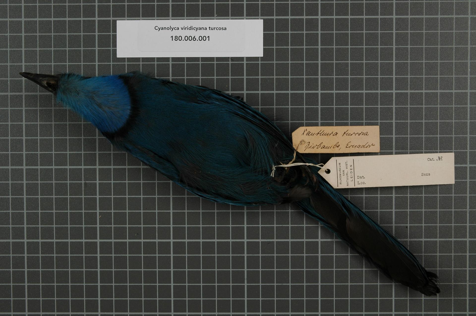 Cyanolyca viridicyana turcosa (Bonaparte, 1853)